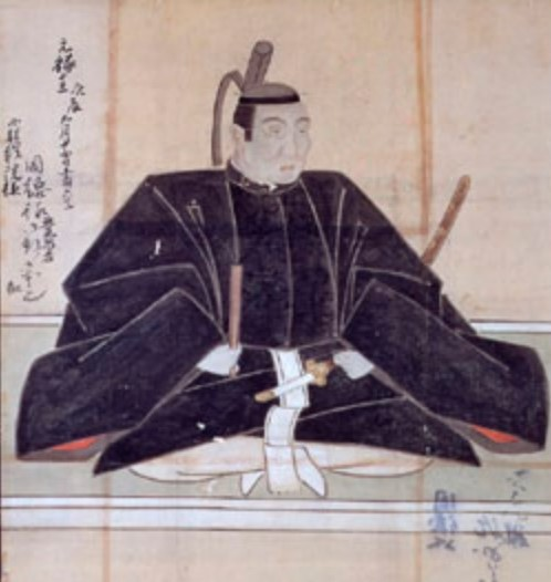 山内豊昌の肖像。